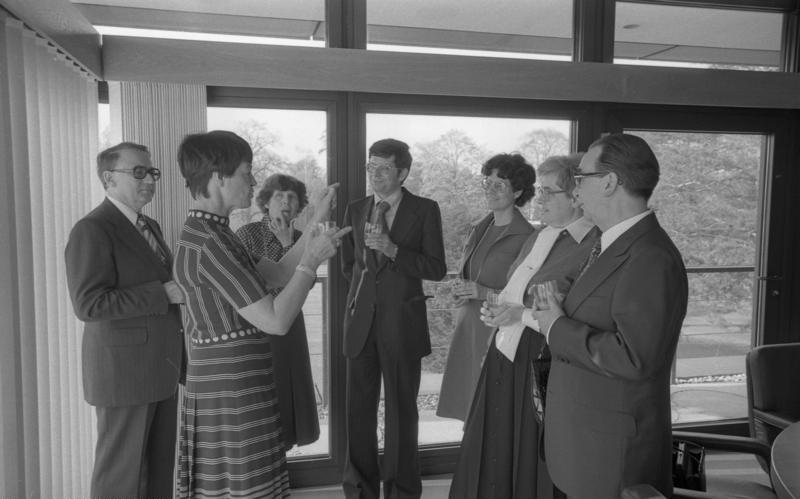 Bundeskanzler Helmut Schmidt empfängt Nachfahren und Nachlaßverwalter deutscher Maler des 20. Jahrhunderts im Bundeskanzleramt